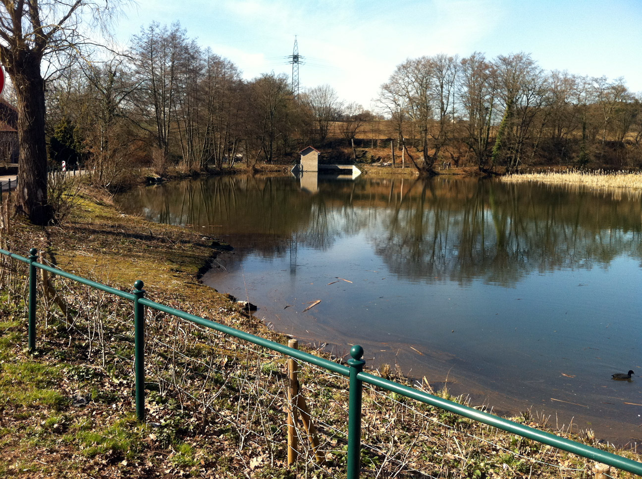 Aprather Teich, Wülfrath-Aprath, Germany